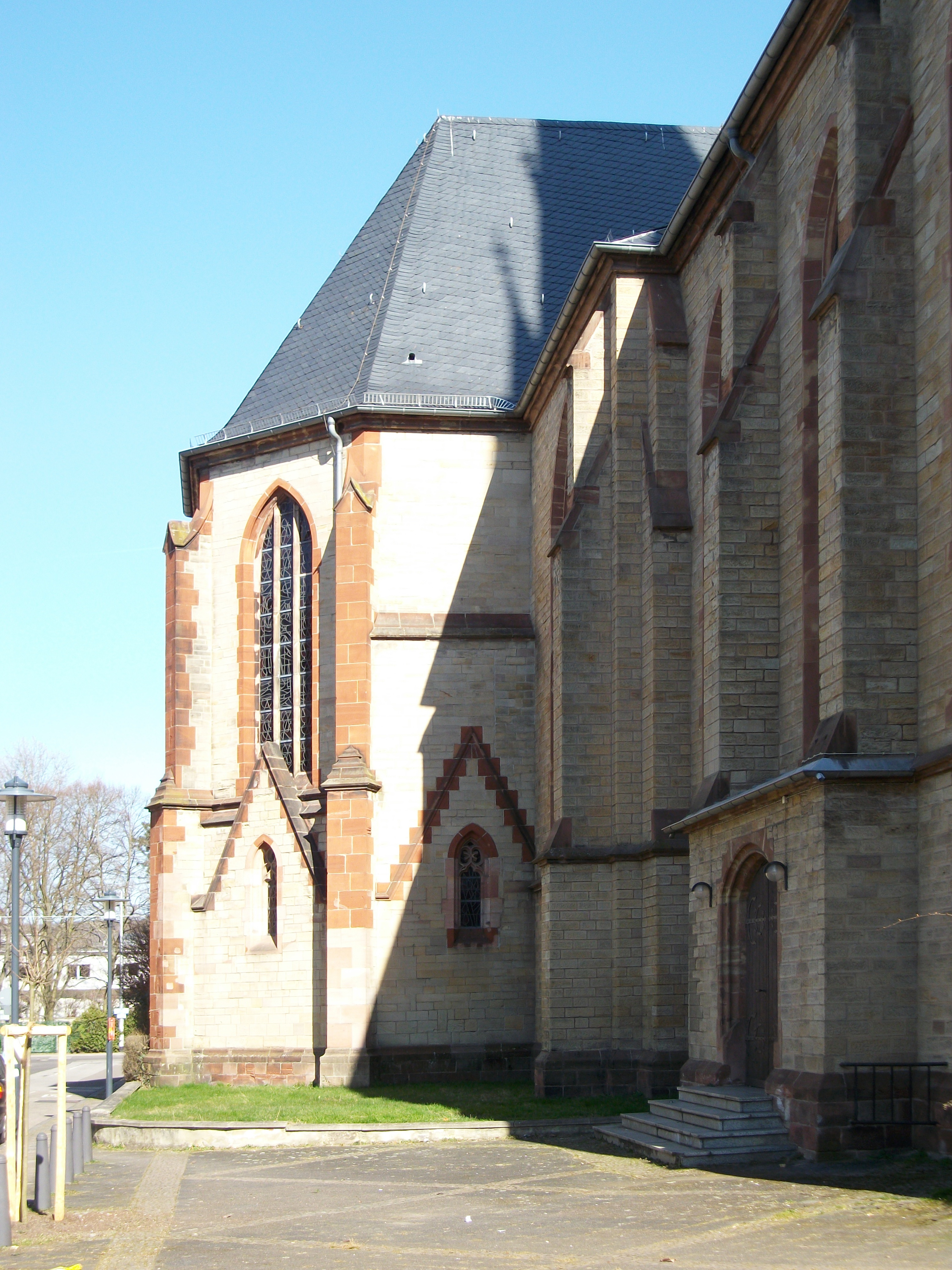 St. Jakob (Saarbrücken)